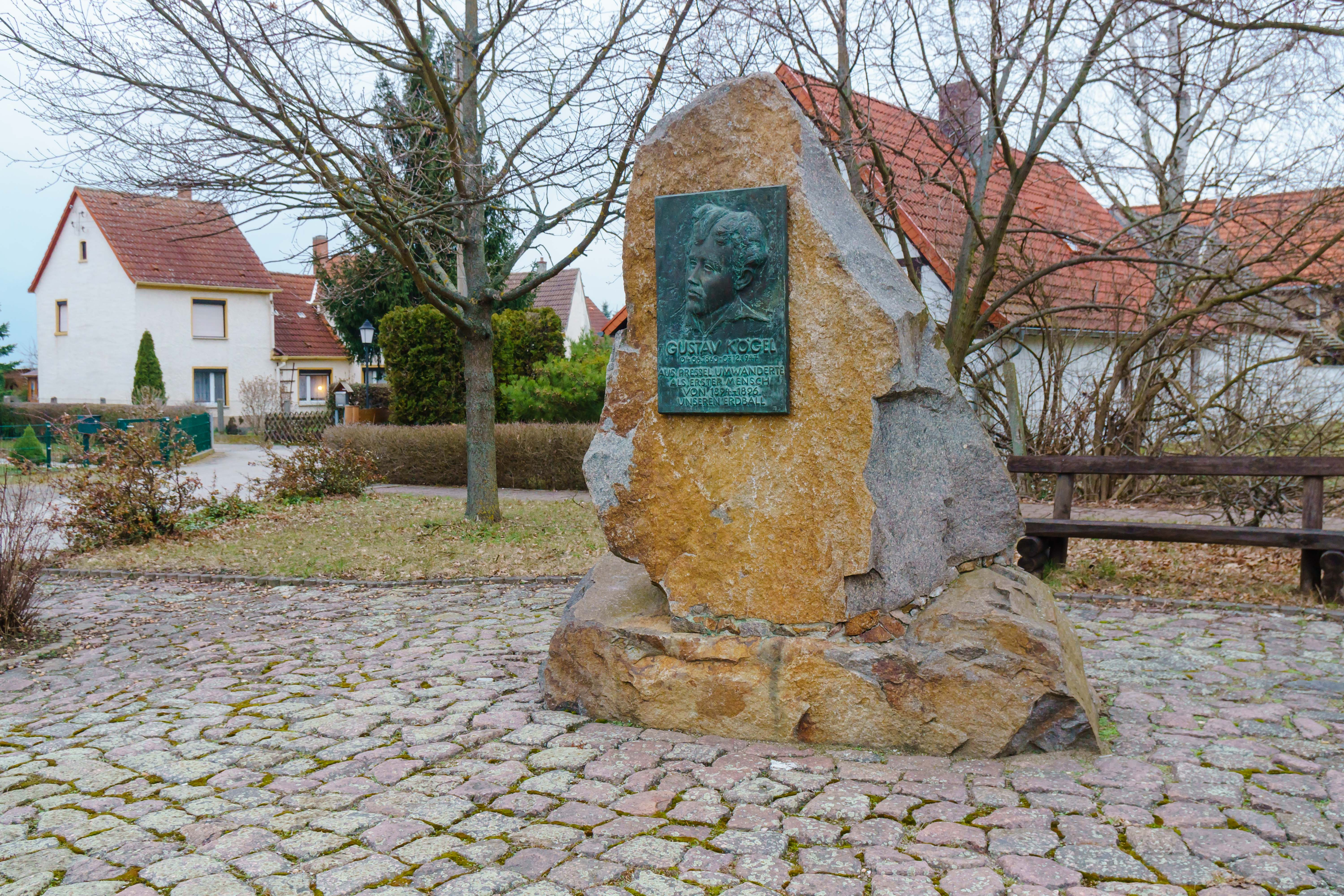 Kögel-Gedenkstein, Ziegeleistraße in Pressel